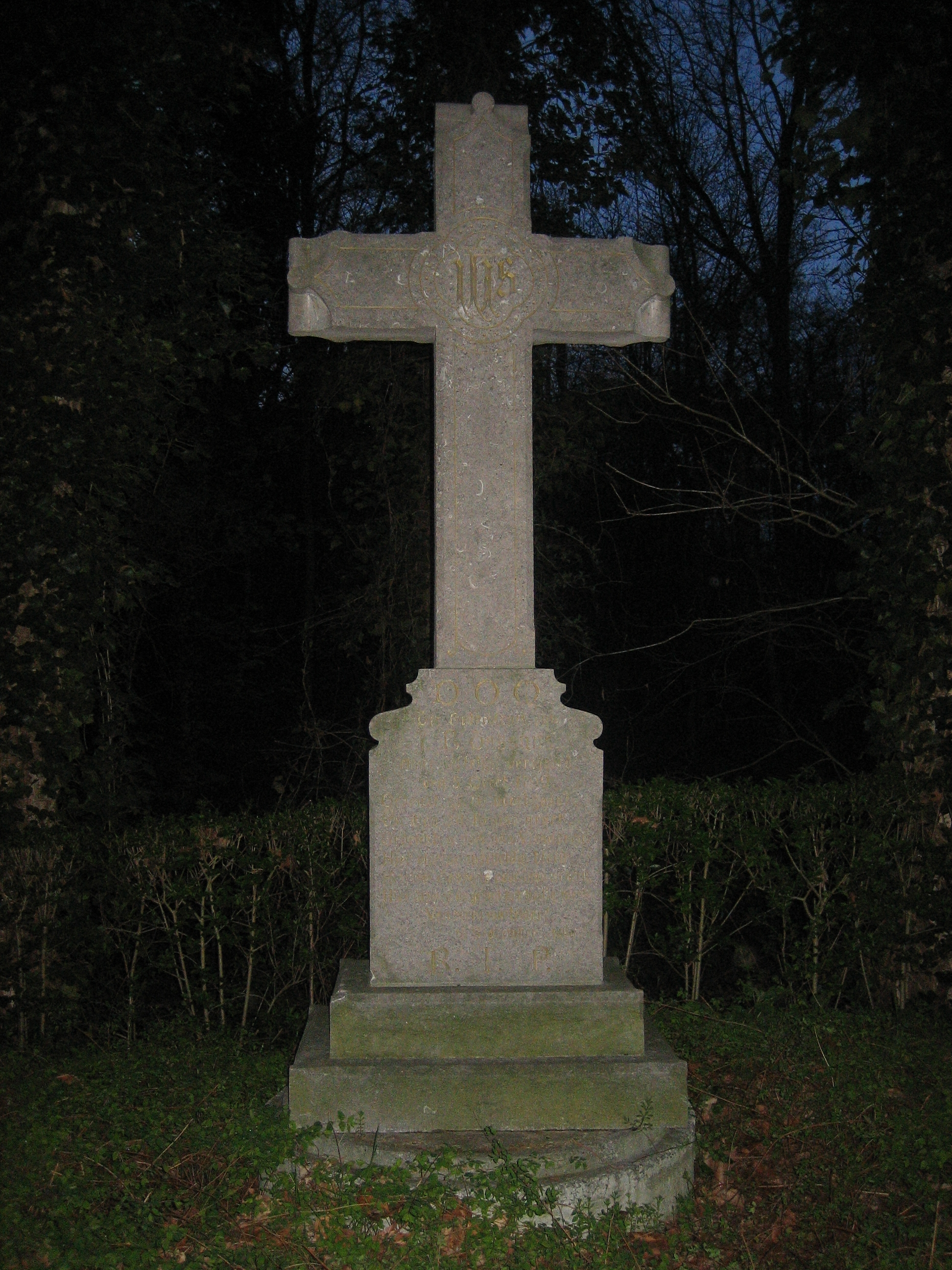 Kruis van blauwe hardsteen in Haasdonk ter nagedachtenis van de Heer Tassijns, neergeschoten door de sanskulotten in 1799 Het draagt als opschrift: D.O.M. Ter gedachtenis van Alhier laffelijk vermoord Den 5 oegst 1799 Gedenkt, gij die voorbijgaat En diep dit kruise groet, Gedenkt o volk van Vlaanderen Hier vloeide onschuldig bloet Hier viel Tassijns voor land en Kerk, Hier draagt de grond het heilig merk Van enen martelaar 18 september 1898 R.I.P.